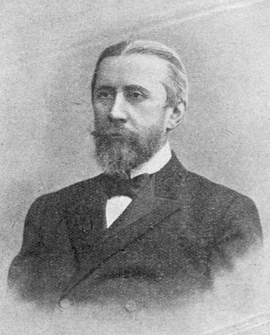 Илья Сергеевич Крашенинников, русский судебный деятель, сенатор, член Государственного совета.